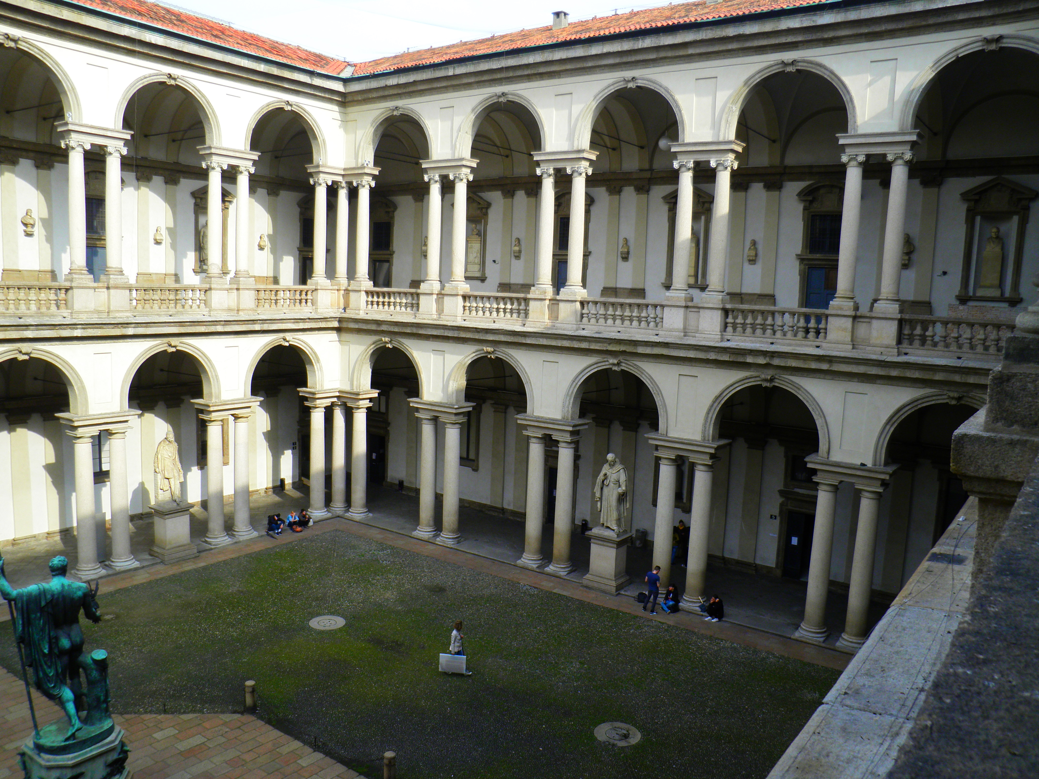 Academia Brera